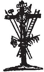 Imatge de la portada del llibre Coblas de la passió y mort de Jesu-Christ nostre Senyor. Barcelona: Estampa de F. Vallés, 1852.